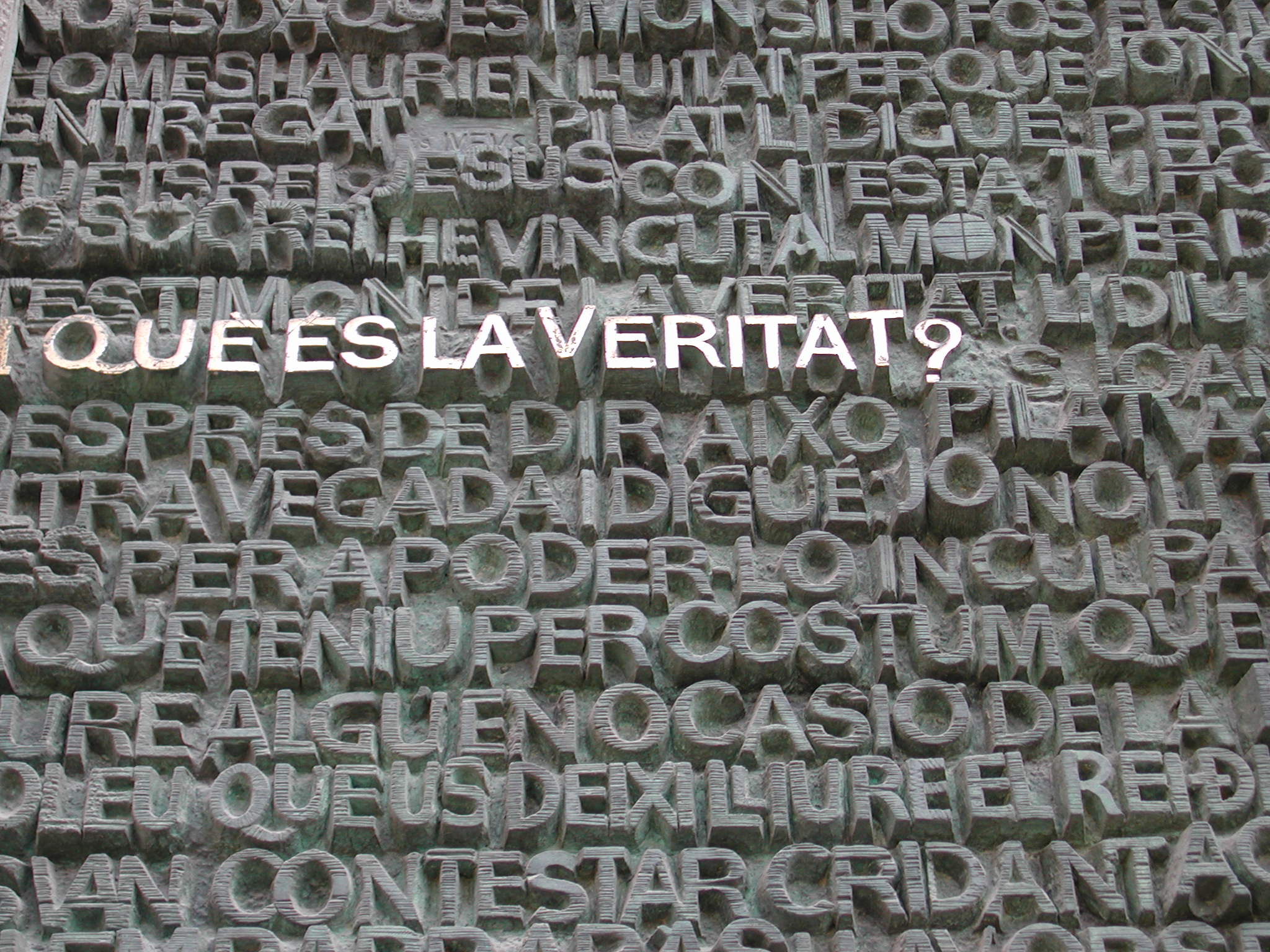 Sagrada Familia, Antoni Gaudí i Cornet, Que es la veritat? Barcelona